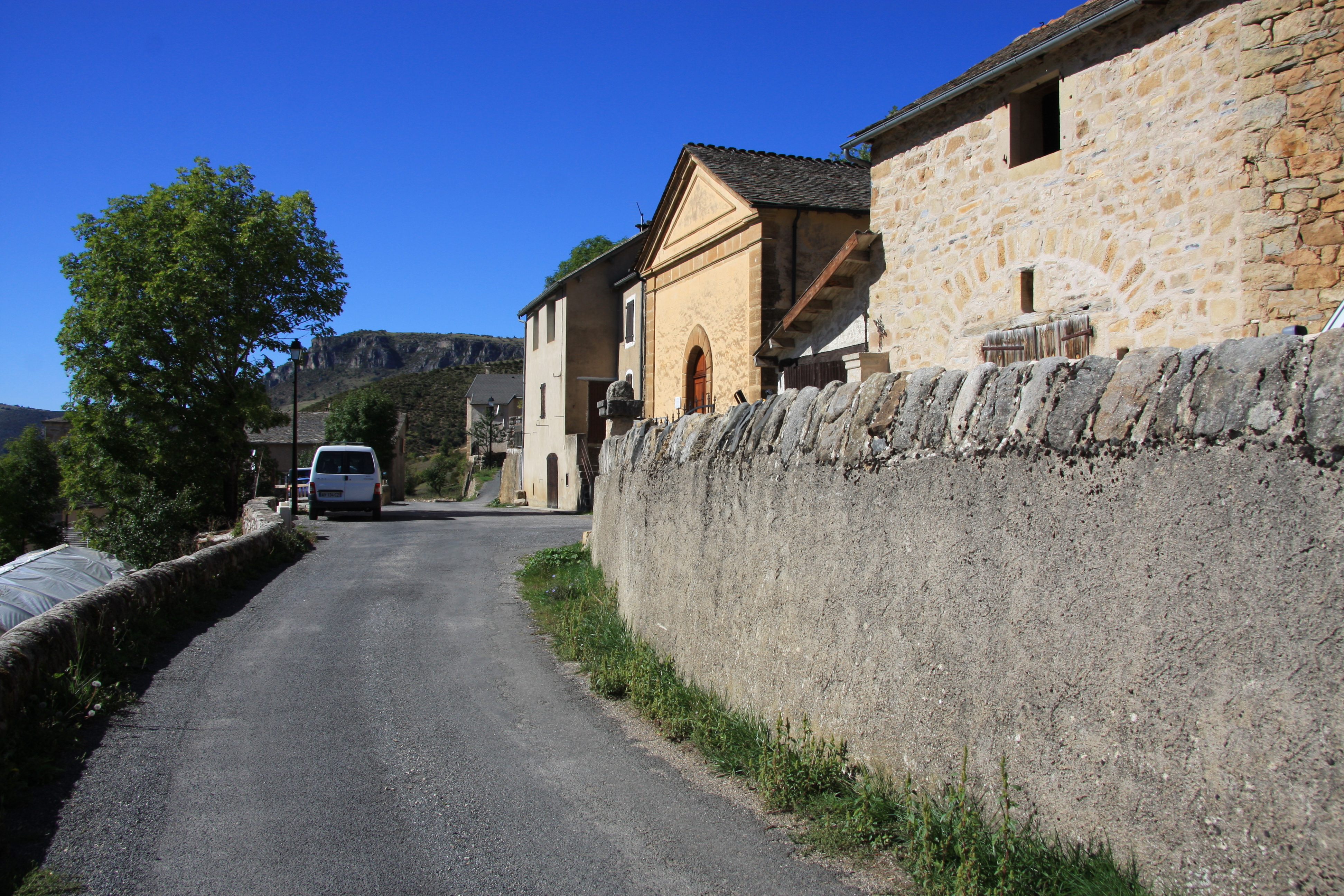 Gatuzières